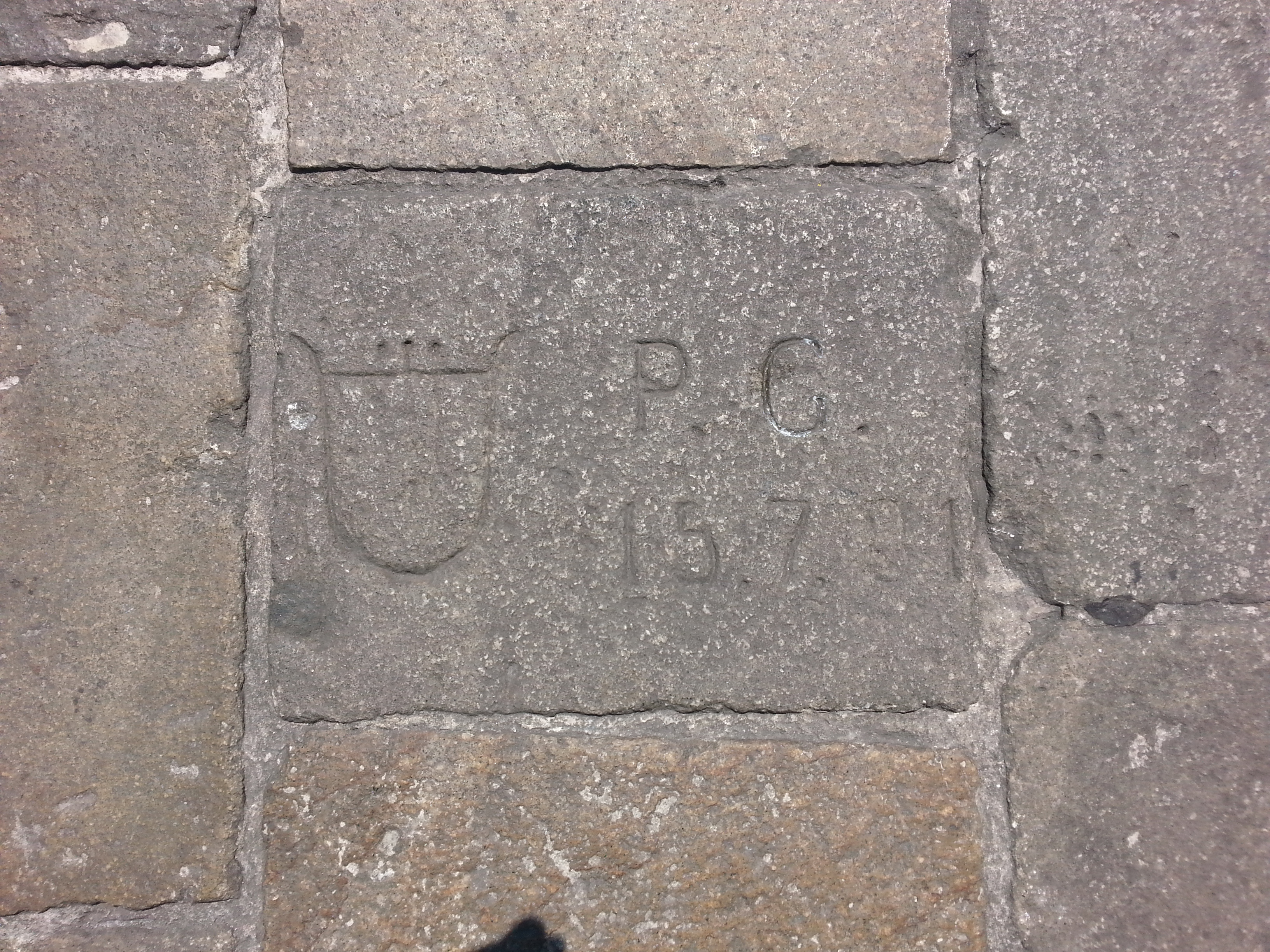 masegna della pavimentazione di Piazza dei Signori a Padova con incisa una lira (strumento musicale) le lettere P. G. e la data 15. 7. 81 Secondo tradizione di riferisce allo smarrimento e successivo ritrovamento di una spilla d'oro in quel punto della piazza. P.G. sarebbero le iniziali del proprietario della spilla e la data di ritrovamento 15 luglio 1881